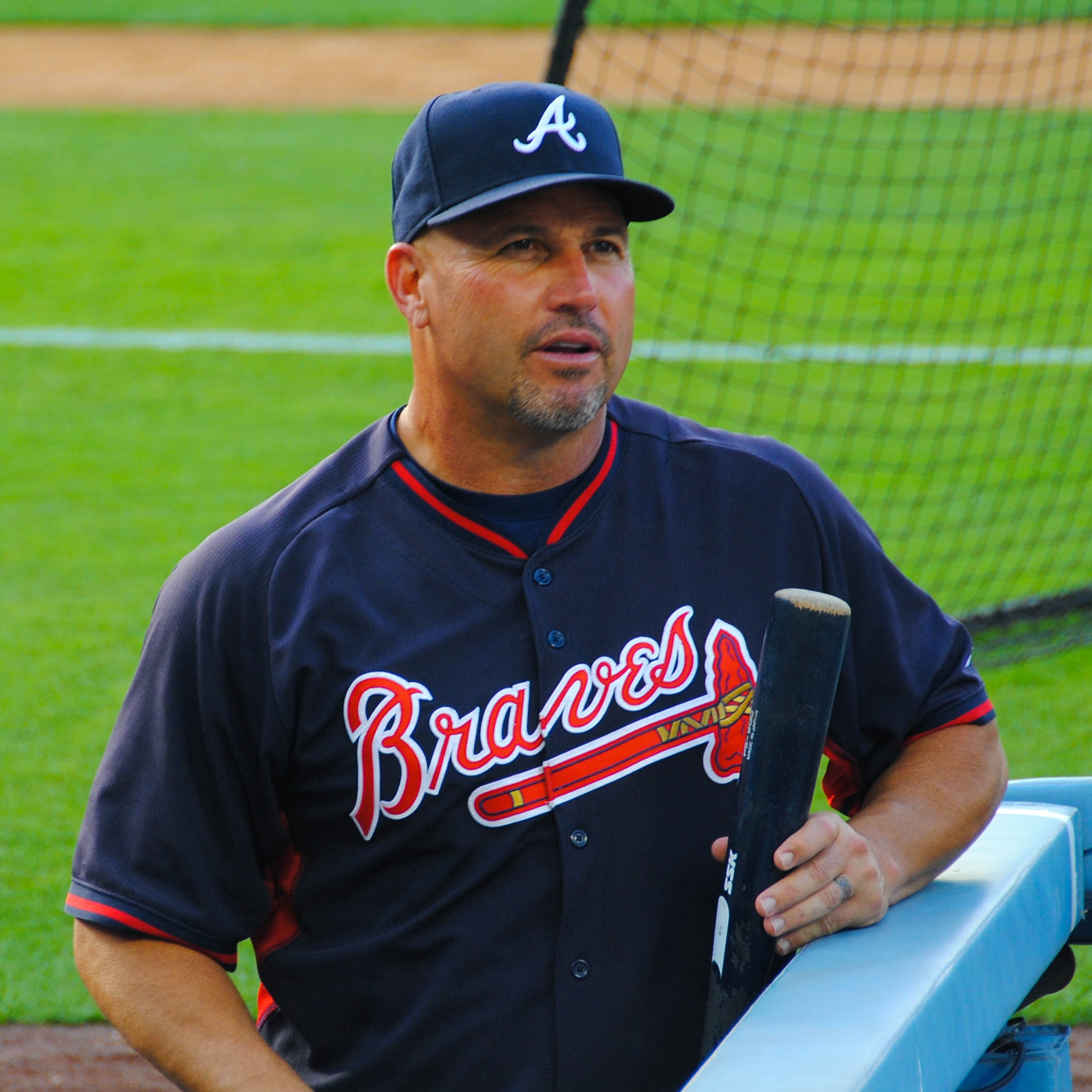 Fredi González